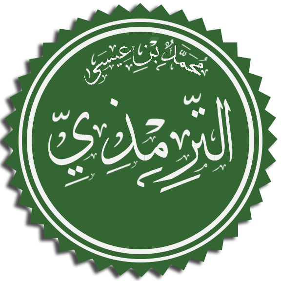 تخطيط اسم محمد بن عيسى الترمذي، صاحب السنن، المحدث